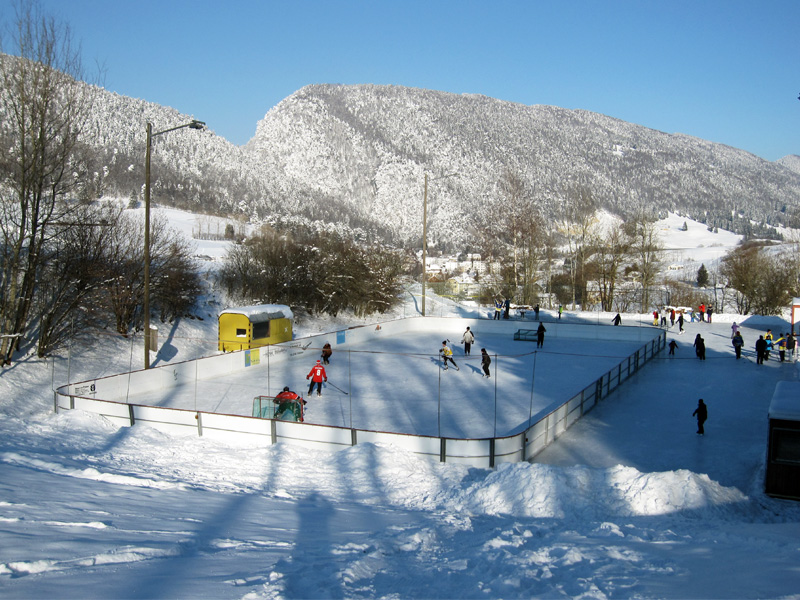 La patinoire de Court avec du public en train de patiner et jouer du hockey le 5 février 2012